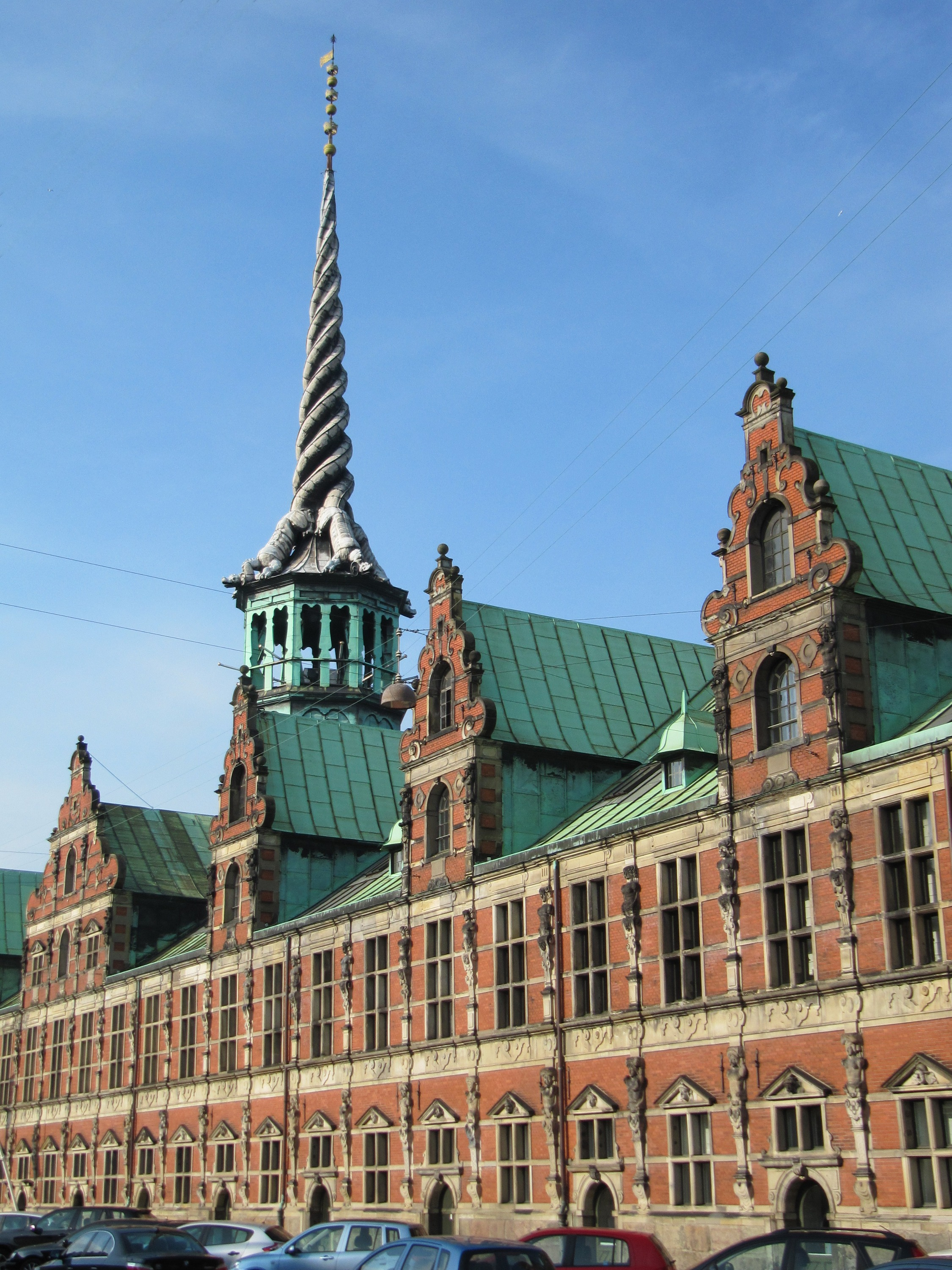 Børsen in Copenhagen, Denmark